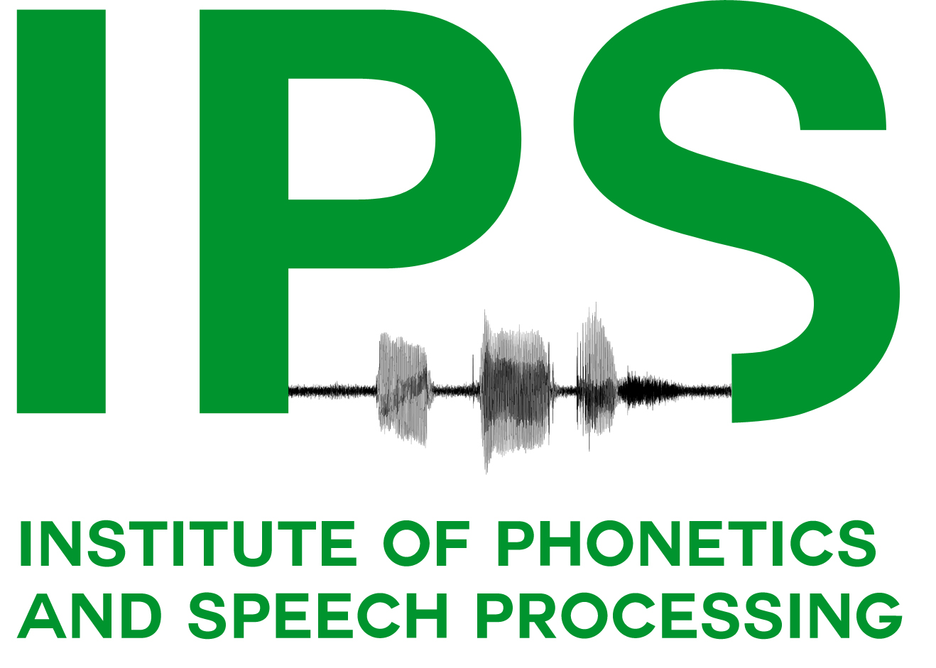 Logo des Instituts für Phonetik und Sprachverarbeitung